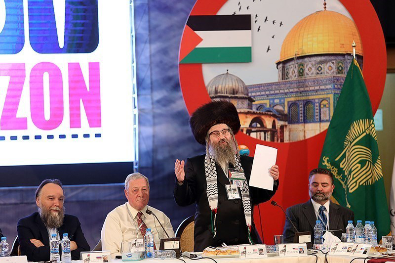 ششمین کنفرانس بین المللی افق نو